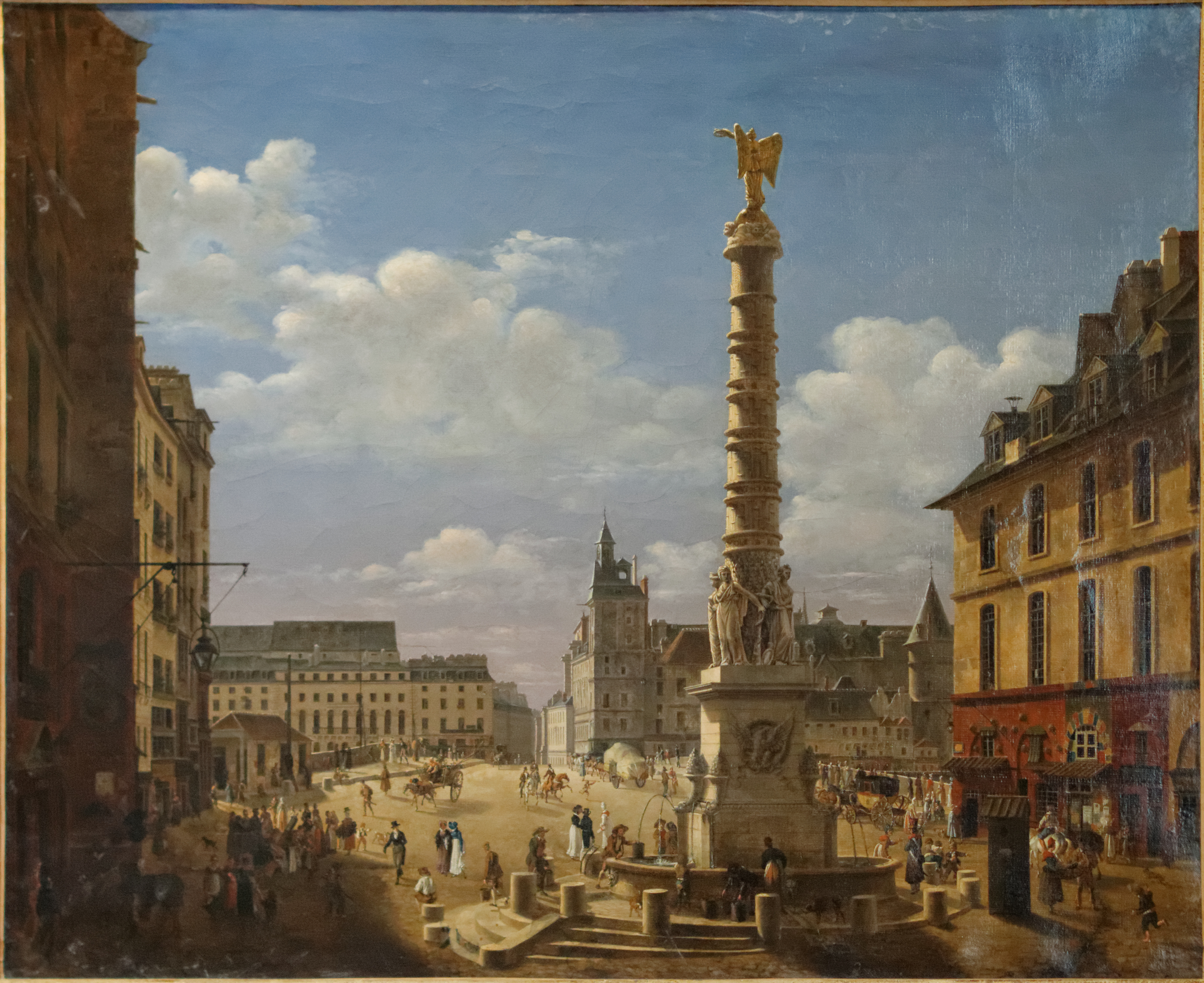 La place du Châtelet (Paris) vers 1810